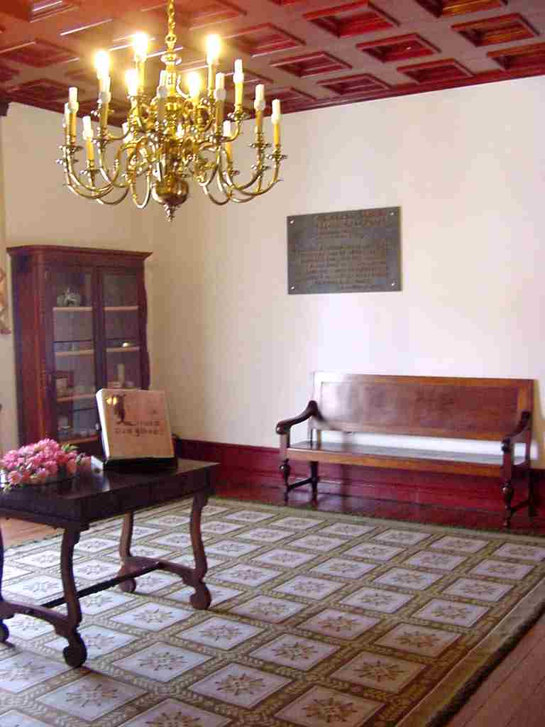 Antigo Paço Episcopal, mais tarde Junta Geral de Angra do Heroísmo, 2º andar.